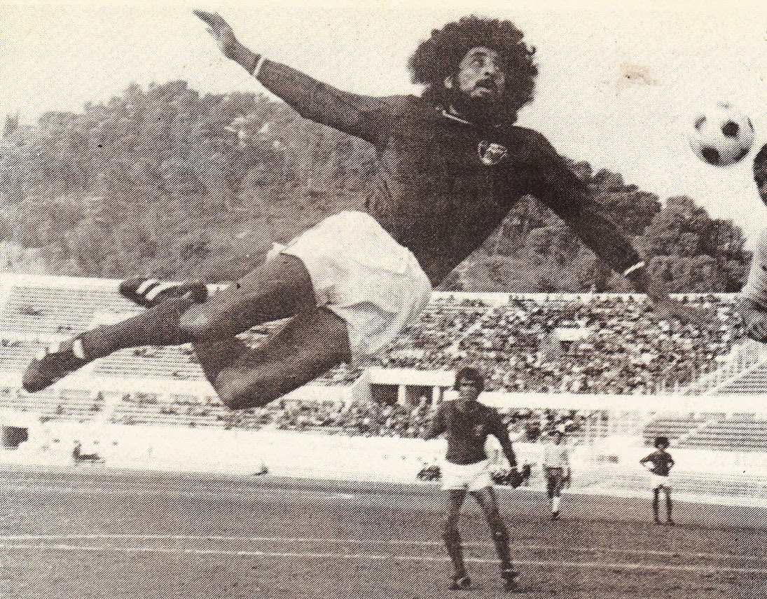 Roma (Italia), stadio Olimpico, 25 ottobre 1975. Il calciatore messicano Leonardo Cuéllar in azione nell'amichevole tra la squadra di club italiana della S.S. Lazio e la nazionale del Messico (0-1).